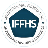 Logo der IFFHS